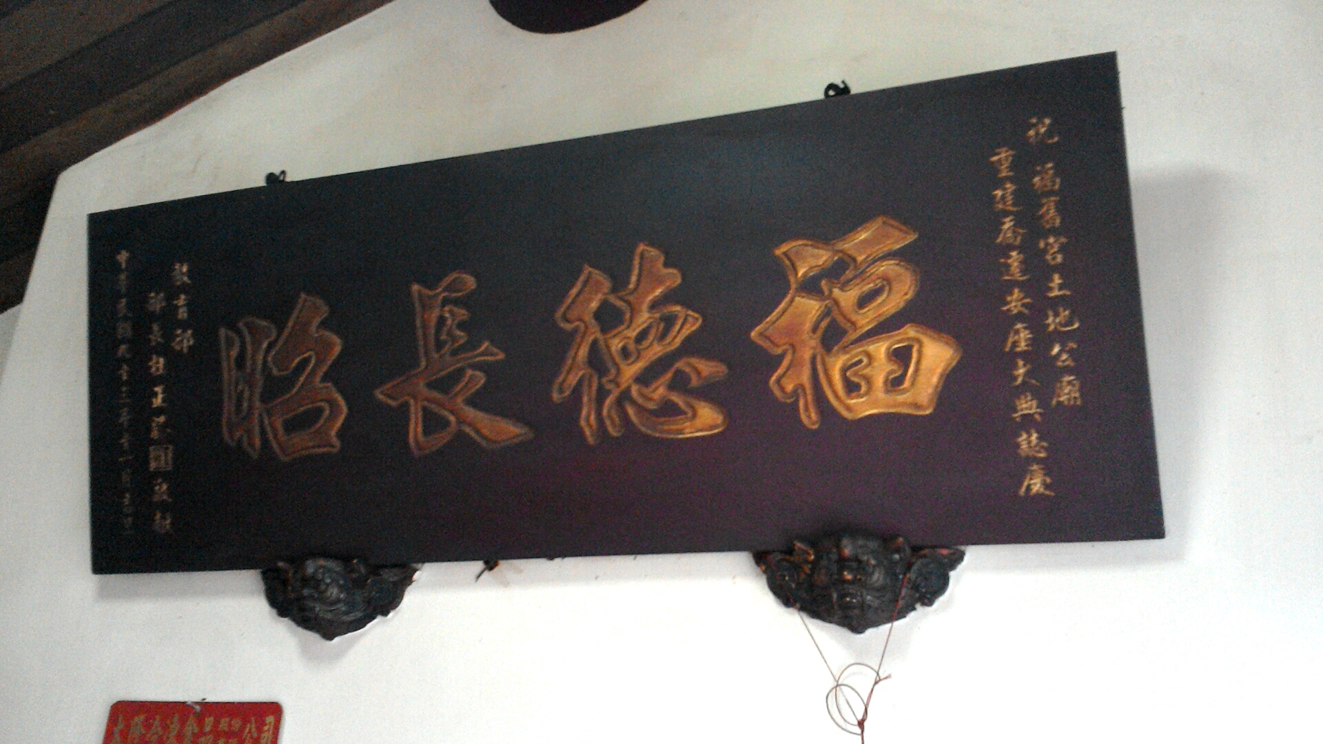 基隆市中正區福舊宮，中華民國教育部部長杜正勝所贈的「福德長昭」匾。